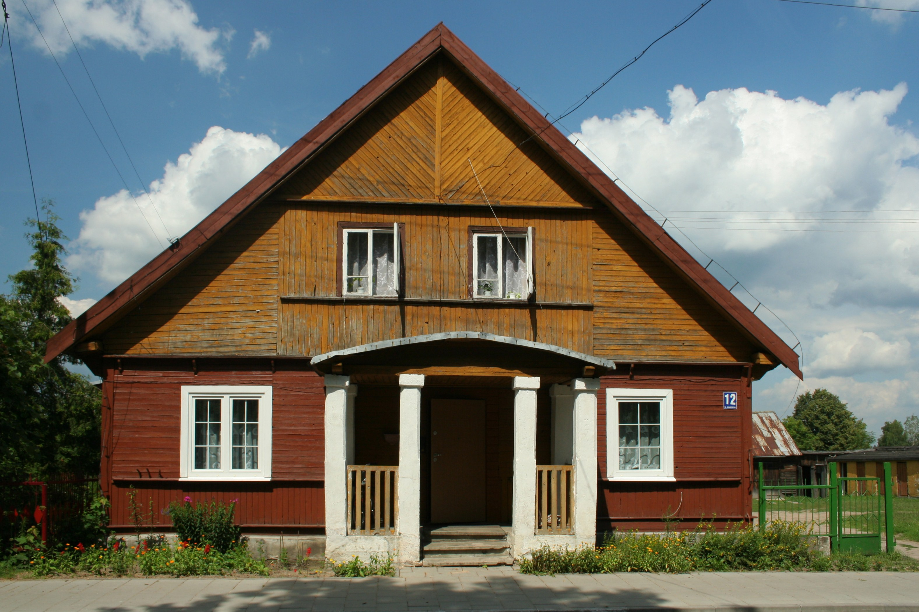 Dom mieszkalny w Gródku.